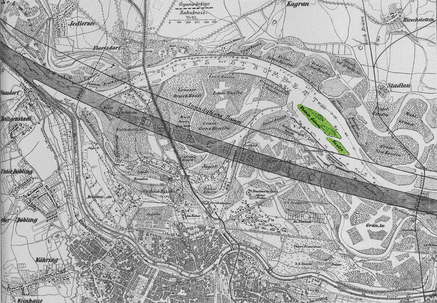 Danube in Vienna